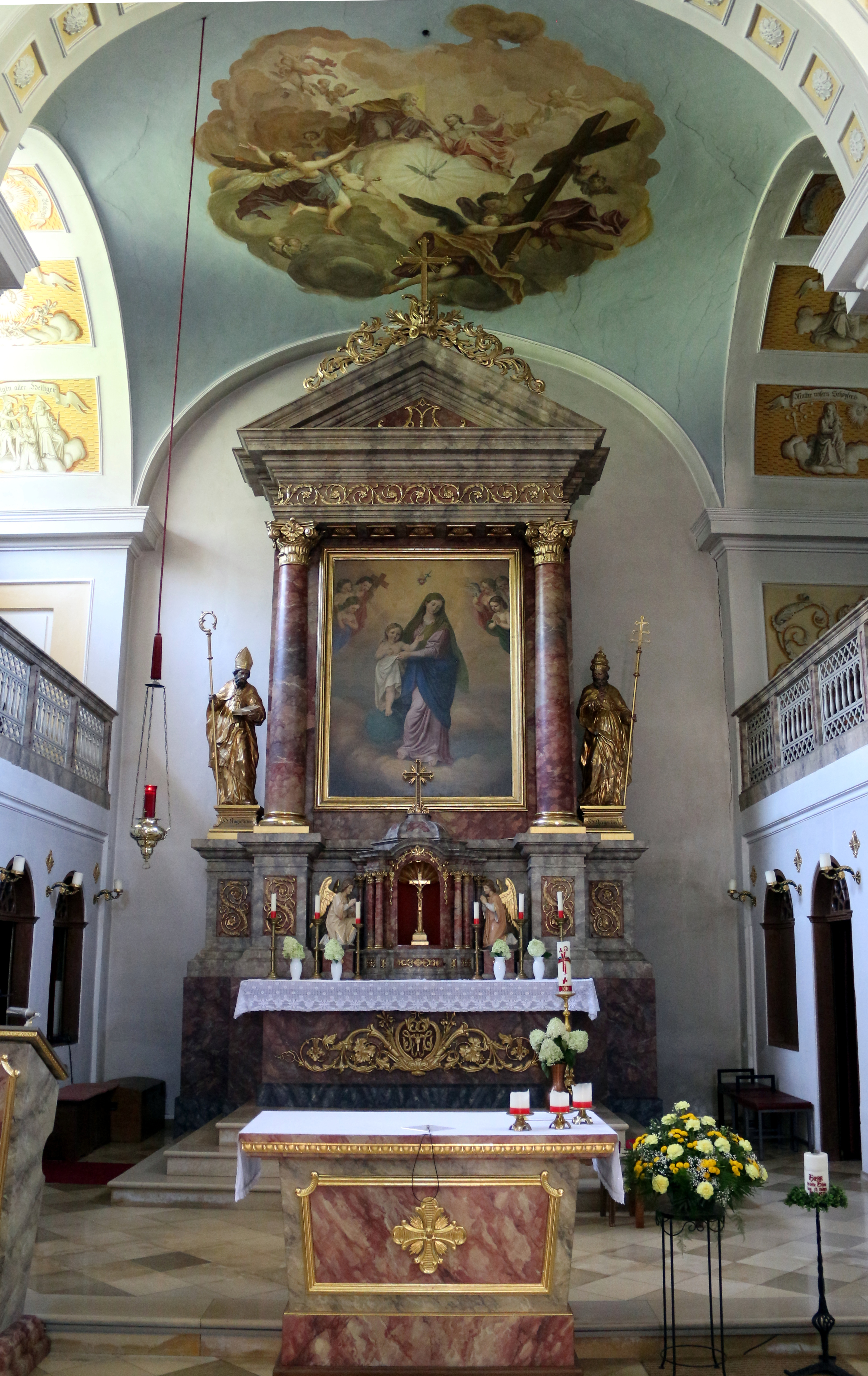 Kath. Pfarrkirche Maria zum Siege in Aschau im Zillertal, Tirol. Chorraum, Malereien 1850 von Johann Endfelder geschaffen.